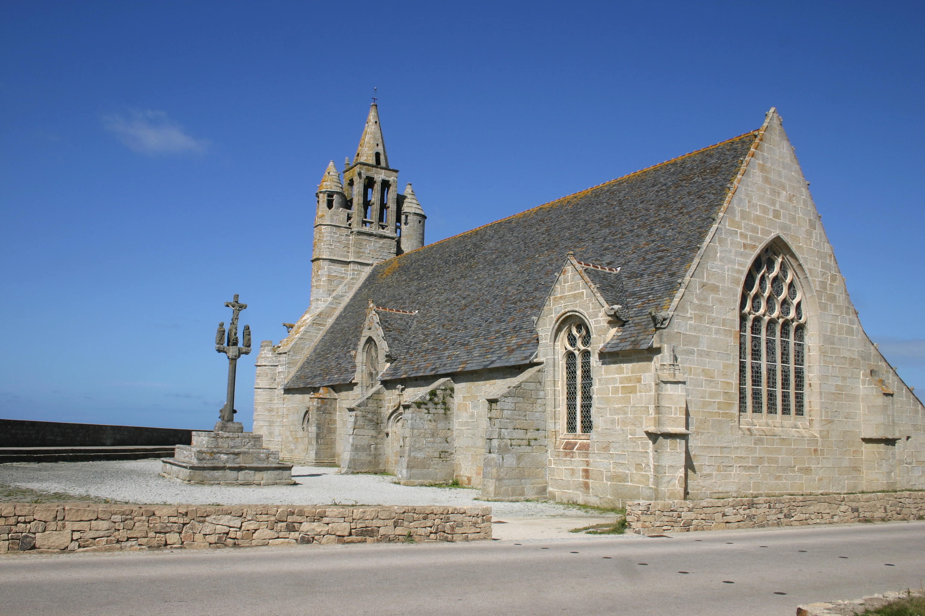 Chapelle Notre-Dame de la joie-Penmarc'h-Finistère-Bretagne-France .